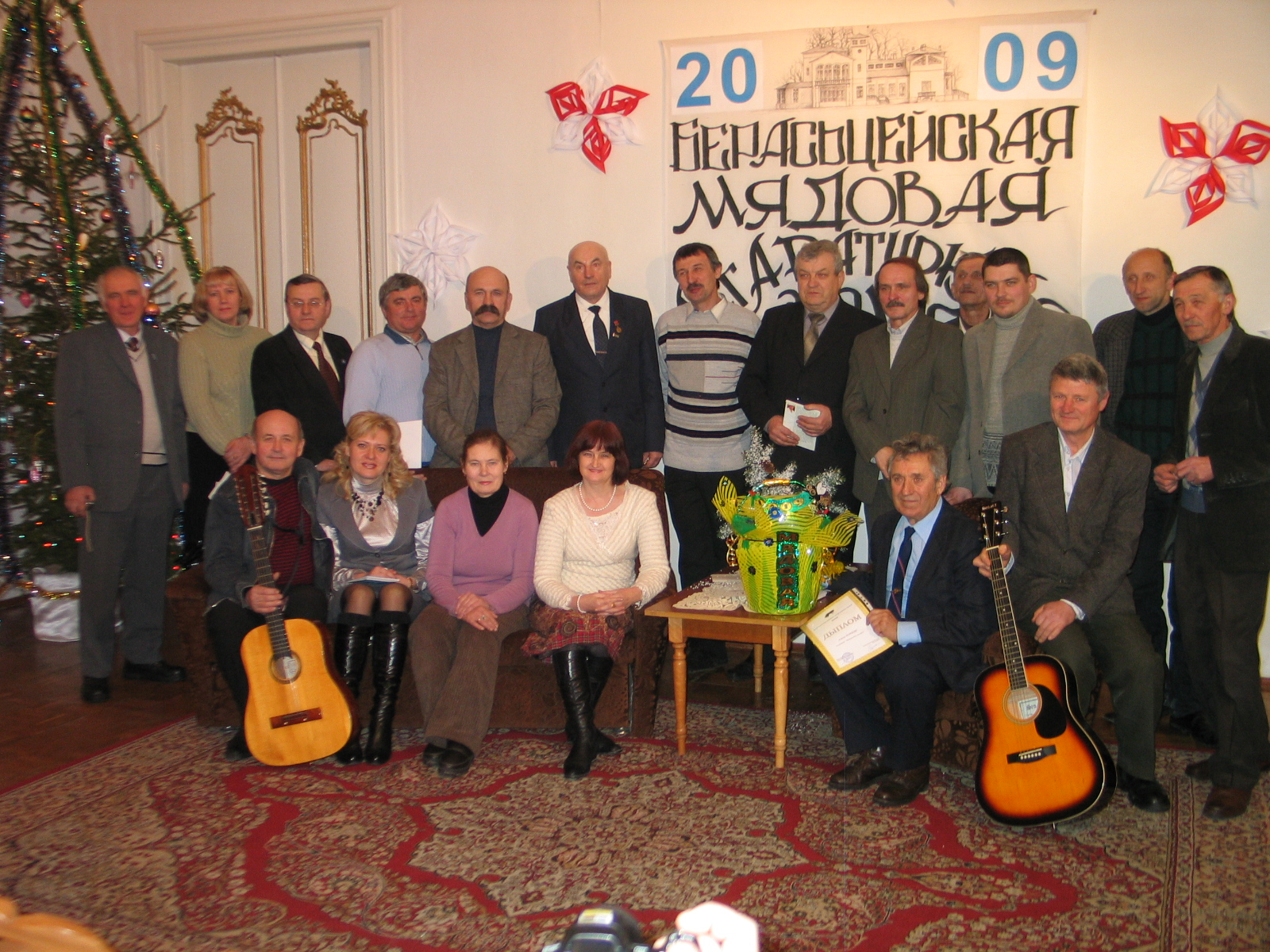 Беларуская (тарашкевіца): Удзельнікі ўганараваньня пераможцы «Мядовай прэміі-2009» у музэі-сядзібе «Пружанскі палацык»